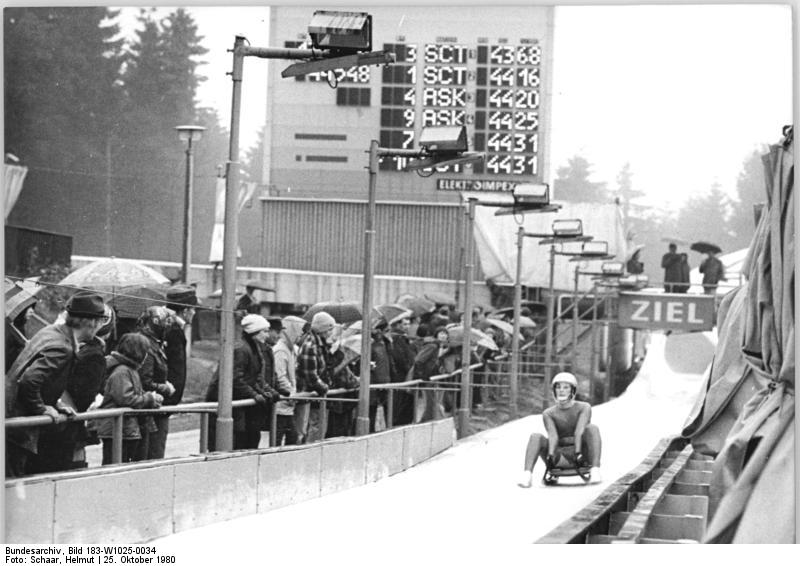 Oberhof, Rennschlittenfahren, Zieleinfahrt ADN-ZB Schaar ru-25.10.1980-Oberhof: Rennschlittensaison eröffnet. Trotz Regen waren viele Zuschauer am Zieleinlauf.